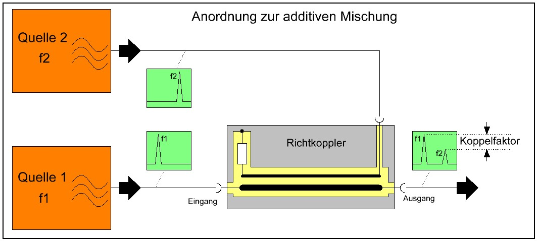 Anordnung zur Additivmischung